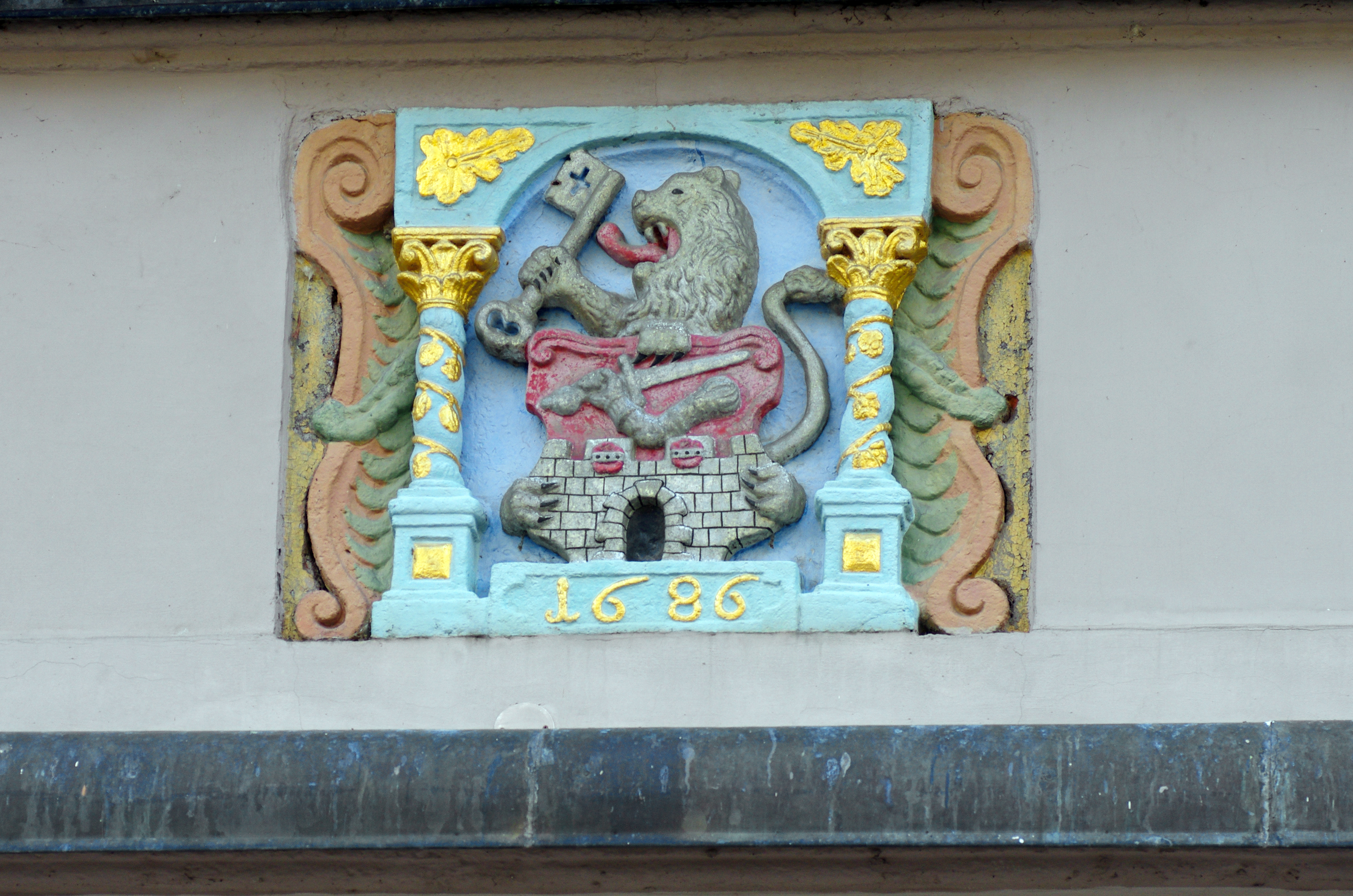 Radnice, T. G. Masaryka 1/69, Loket (okres Sokolov).